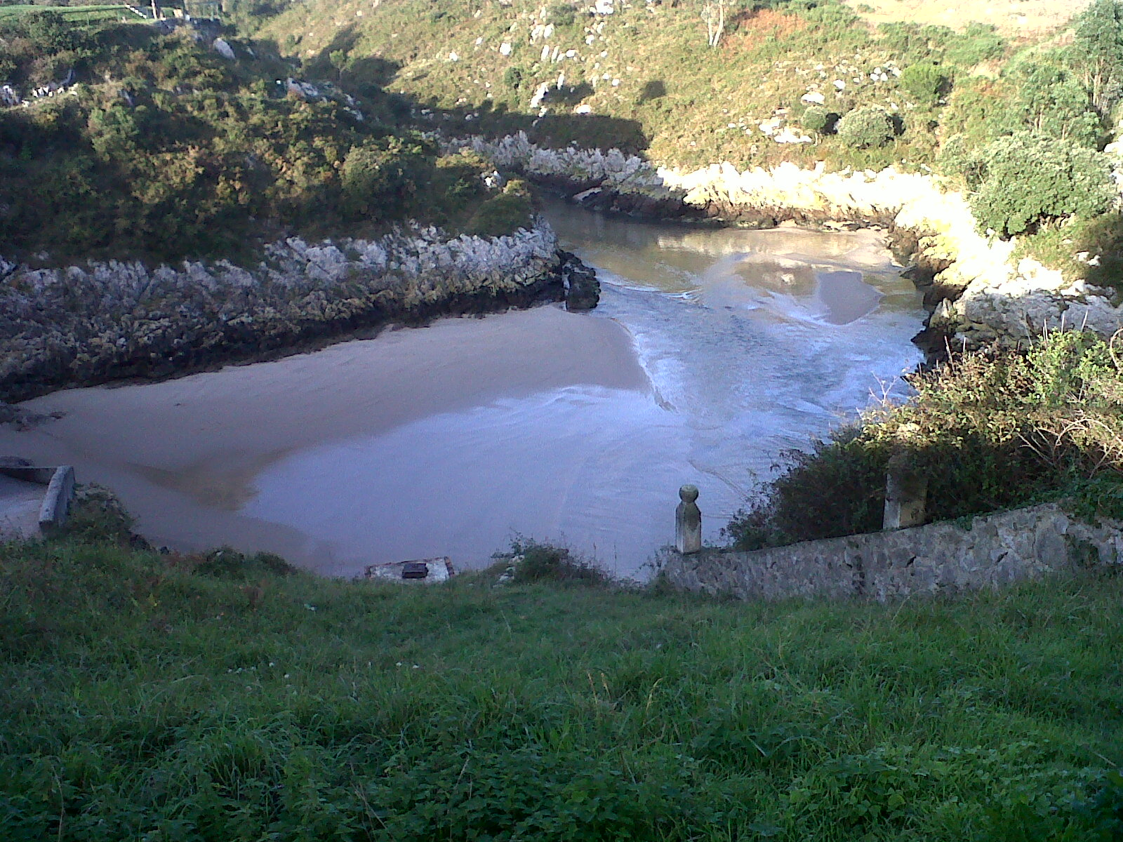 Rio Guadamía en su desembocadura (Playa de Guadamía) con marea baja